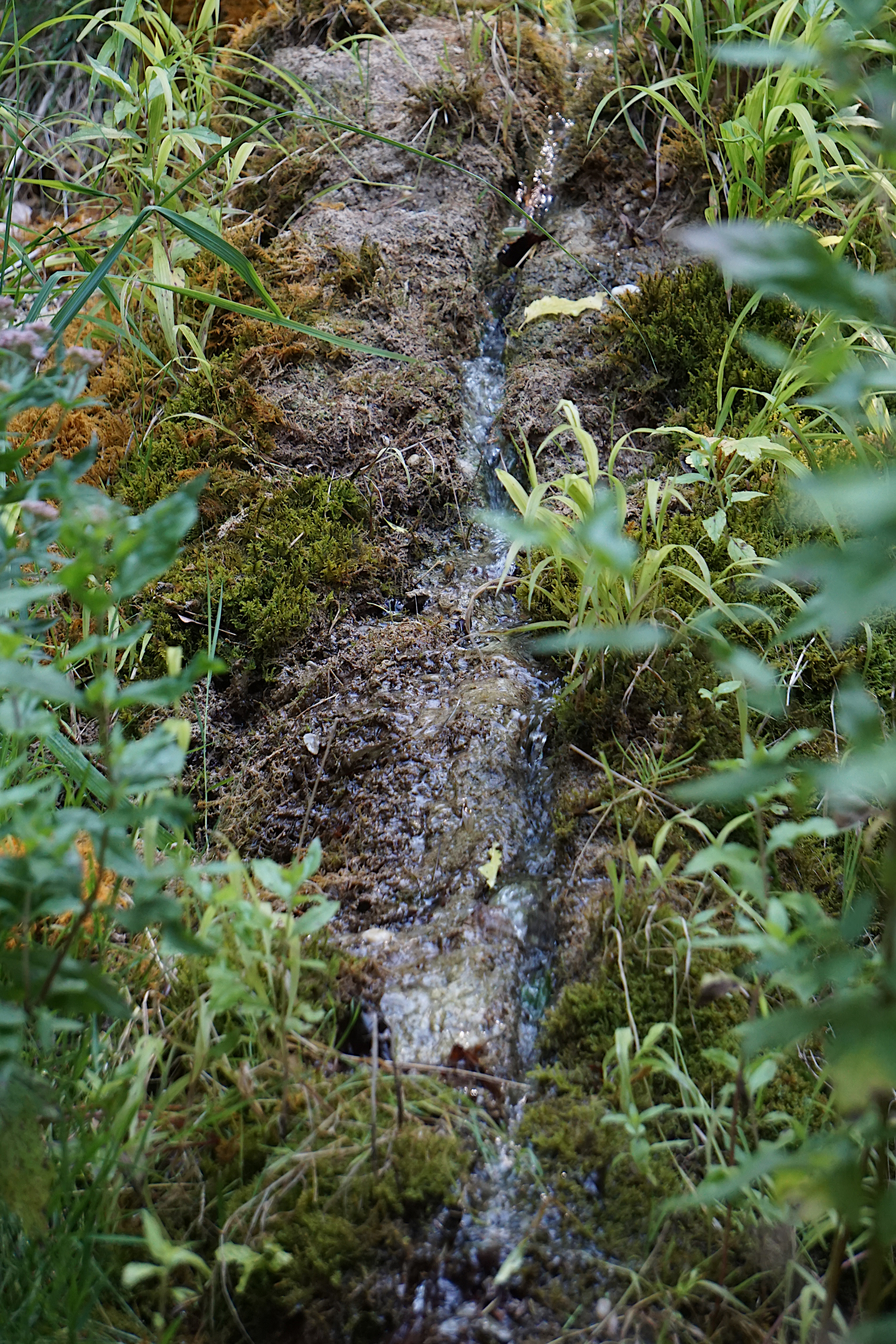 An einem Mergelhorizont innerhalb der Nördlichen Vollschotter tritt hier Wasser zu Tage. An dieser kleinen Schichtquelle hat sich eine kurze, aber schöne sogenannte Steinerne Rinne ausgebildet, d. h., das Wasser fließt in einer Rinne aus Kalktuff. Sowohl anorganische, als auch organische Prozesse spielen bei der Ausfällung des im Wasser gelösten Kalks eine Rolle. Beim Aufbau der Rinne sind Quellmoose und verschiedene Algen und Mikroorganismen beteiligt.